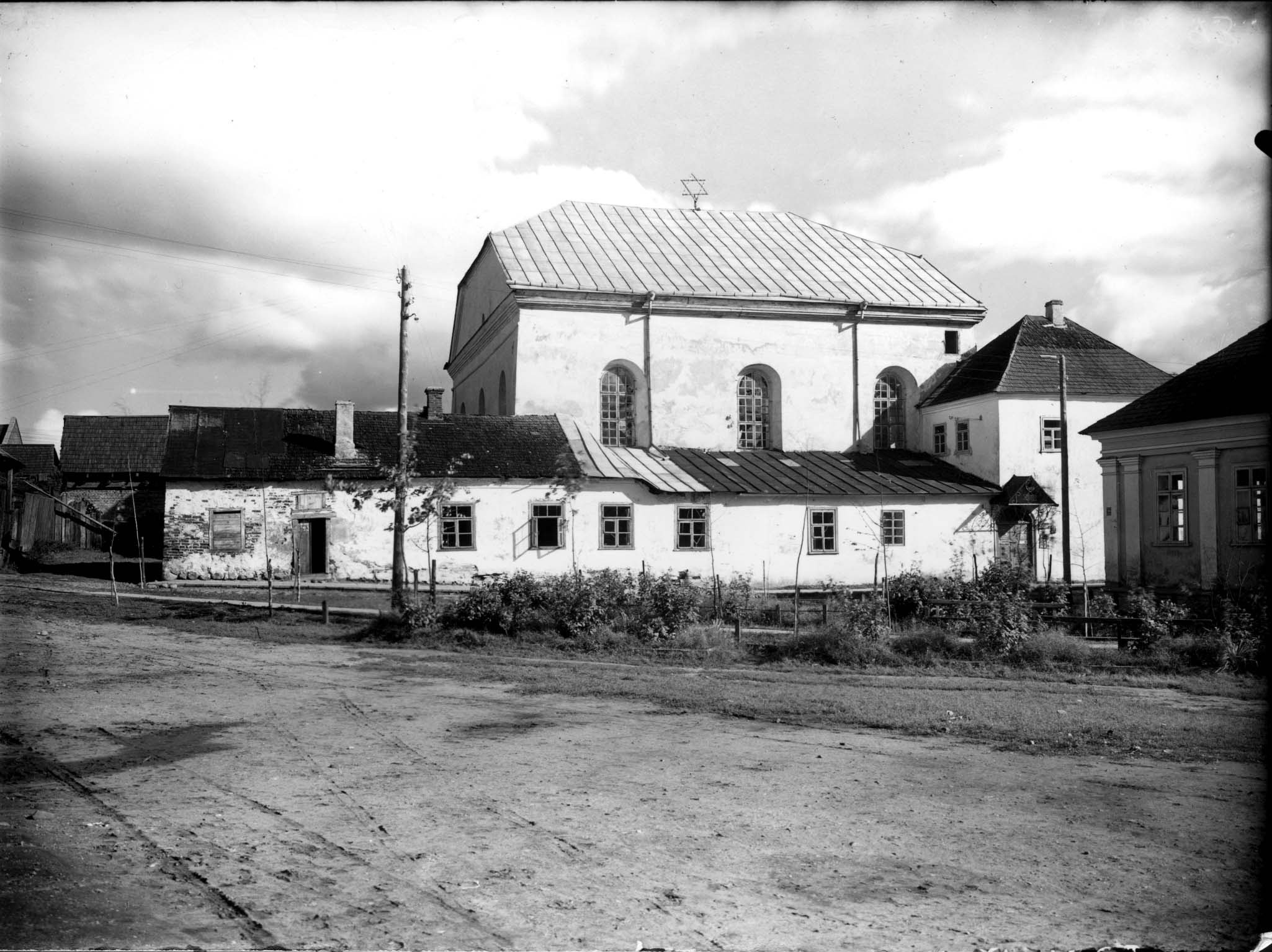 Беларуская (тарашкевіца): Наваградак (Navahradak), завулак Сынагогальны (zavułak Synagogalny). Вялікая Сынагога.